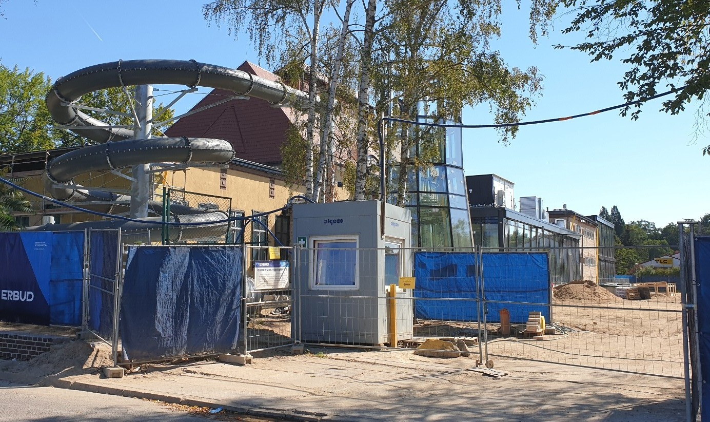 Stargard. Pływalnia OSiR